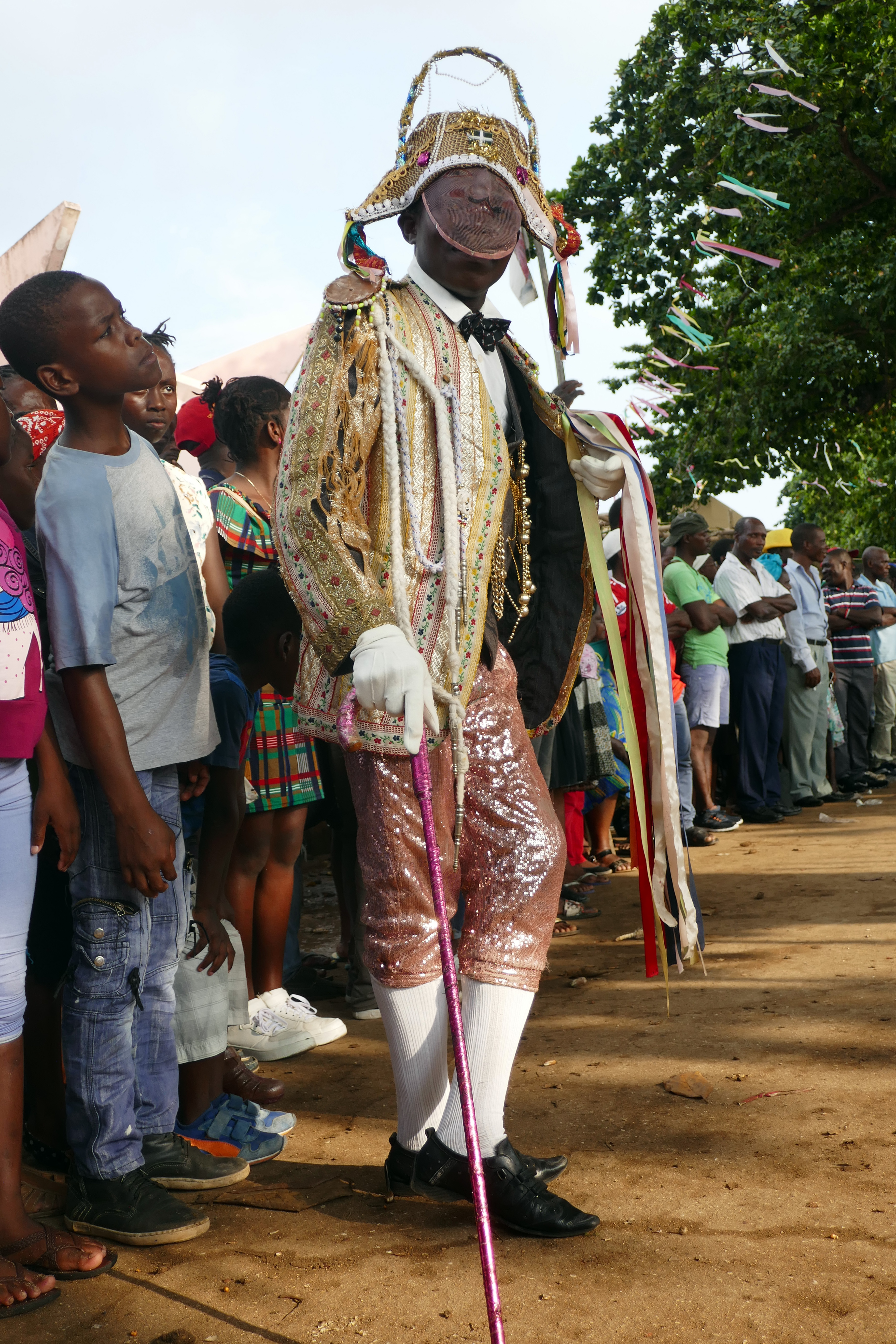 Tchiloli représenté devant l'église São Pedrão de São Tomé à l'occasion de la fête patronale. Le tchiloli est une forme théâtrale, musicale et dansée créée au XVIe siècle, jouée par des pêcheurs et des paysans. Traditionnellement elle met en scène la seule pièce du répertoire, La tragédie du marquis de Mantoue et de l'empereur Charlemagne". This is an image with the theme "Play" from: Sao Tome and Principe